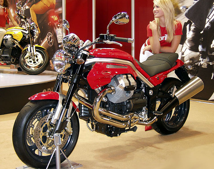 Moto Guzzi Griso (2006)